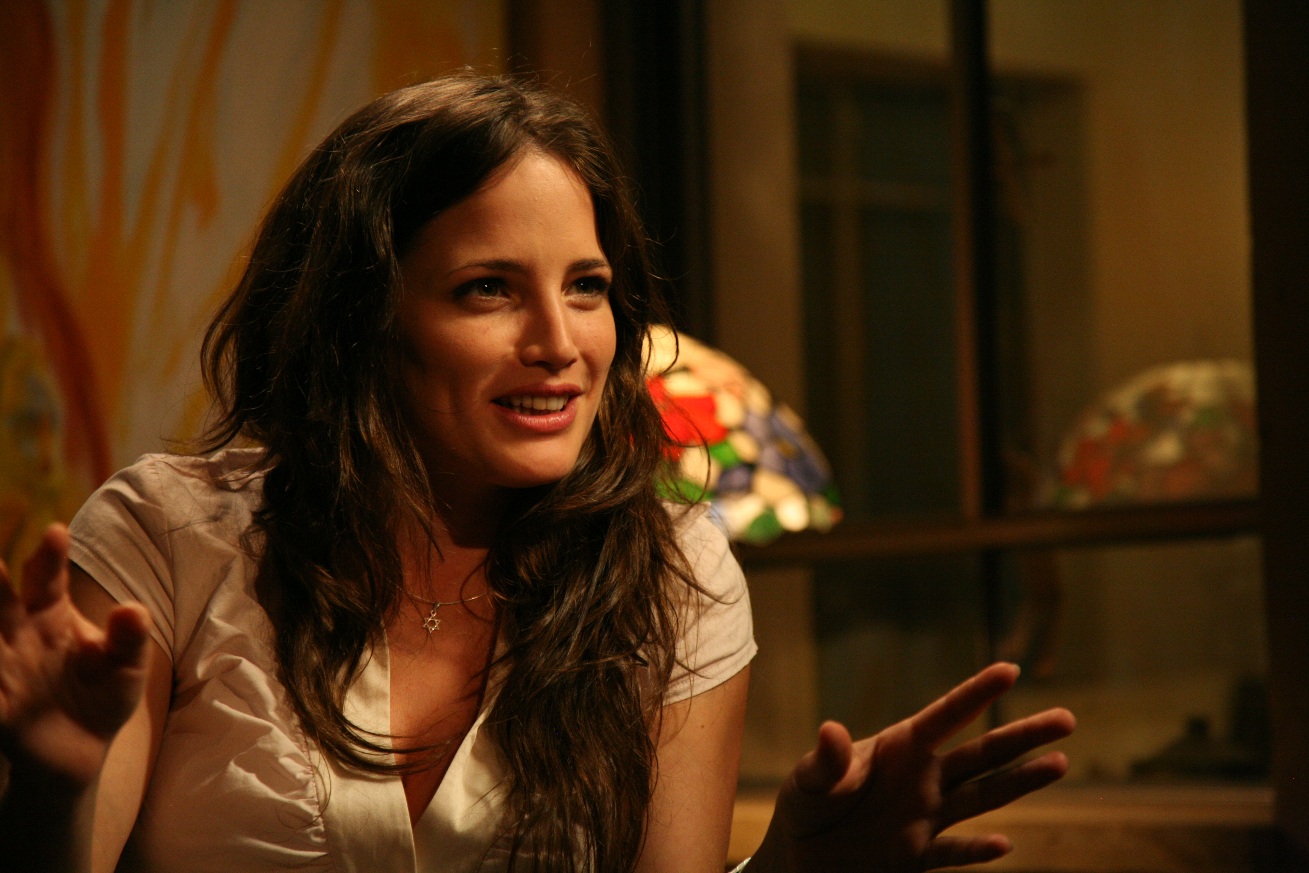 נועה מימן על סט הסרט – השיבה הביתה